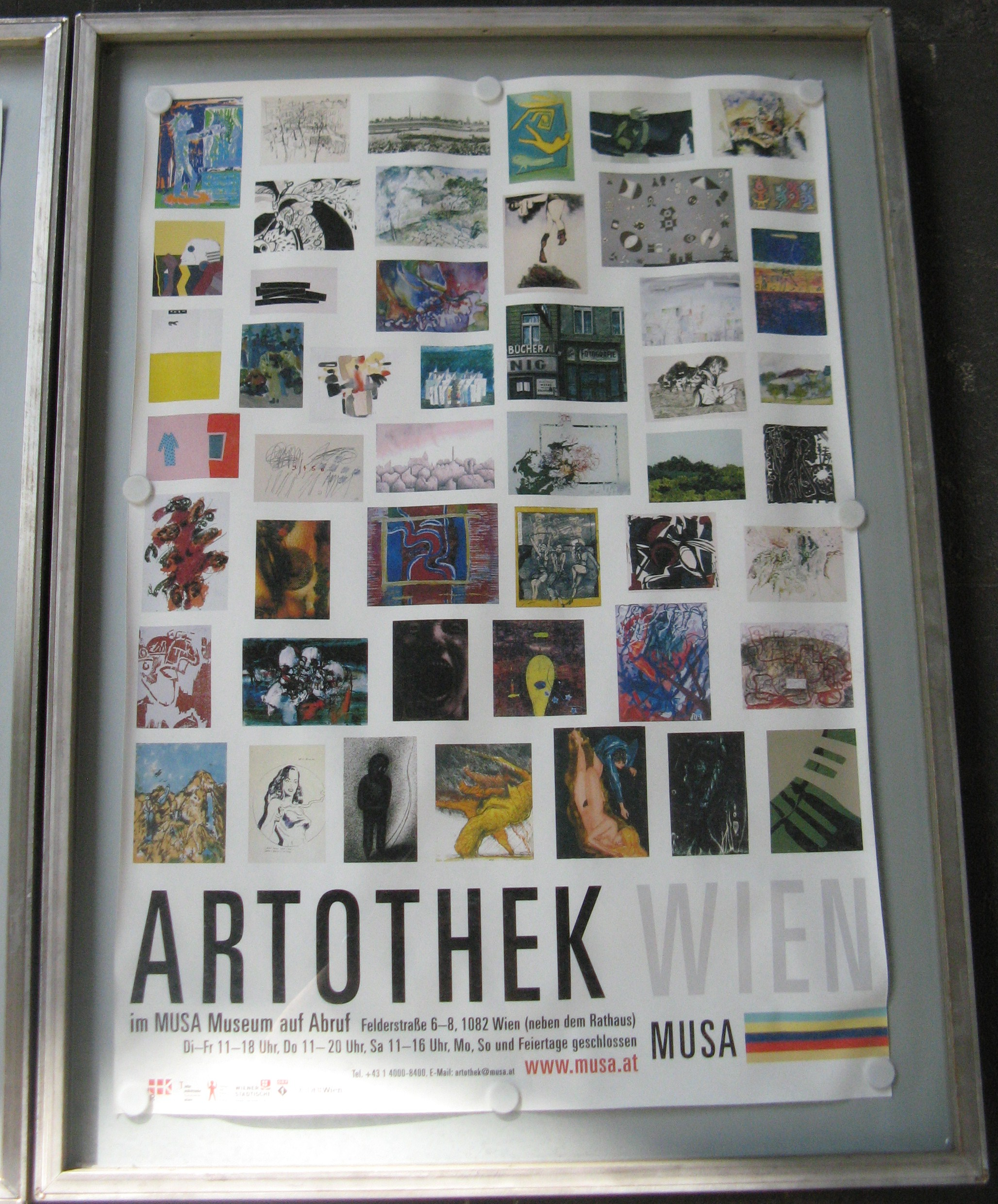 Artothek, Felderstraße 6-8, Wien-Innere Stadt